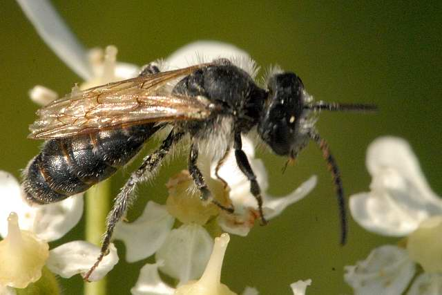 Probably Andrena sp. male